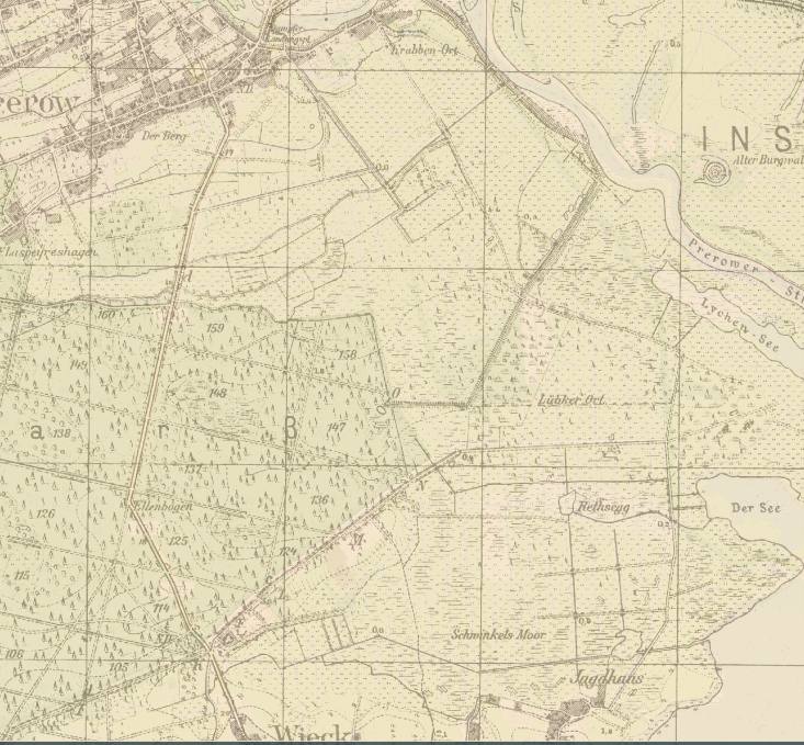 Die Flur zwischen den Orten Prerow und Wieck - mit den Wiesen und Forsten, Rethwiesen, Sümpfen und Wegenetz - Stand 1932.